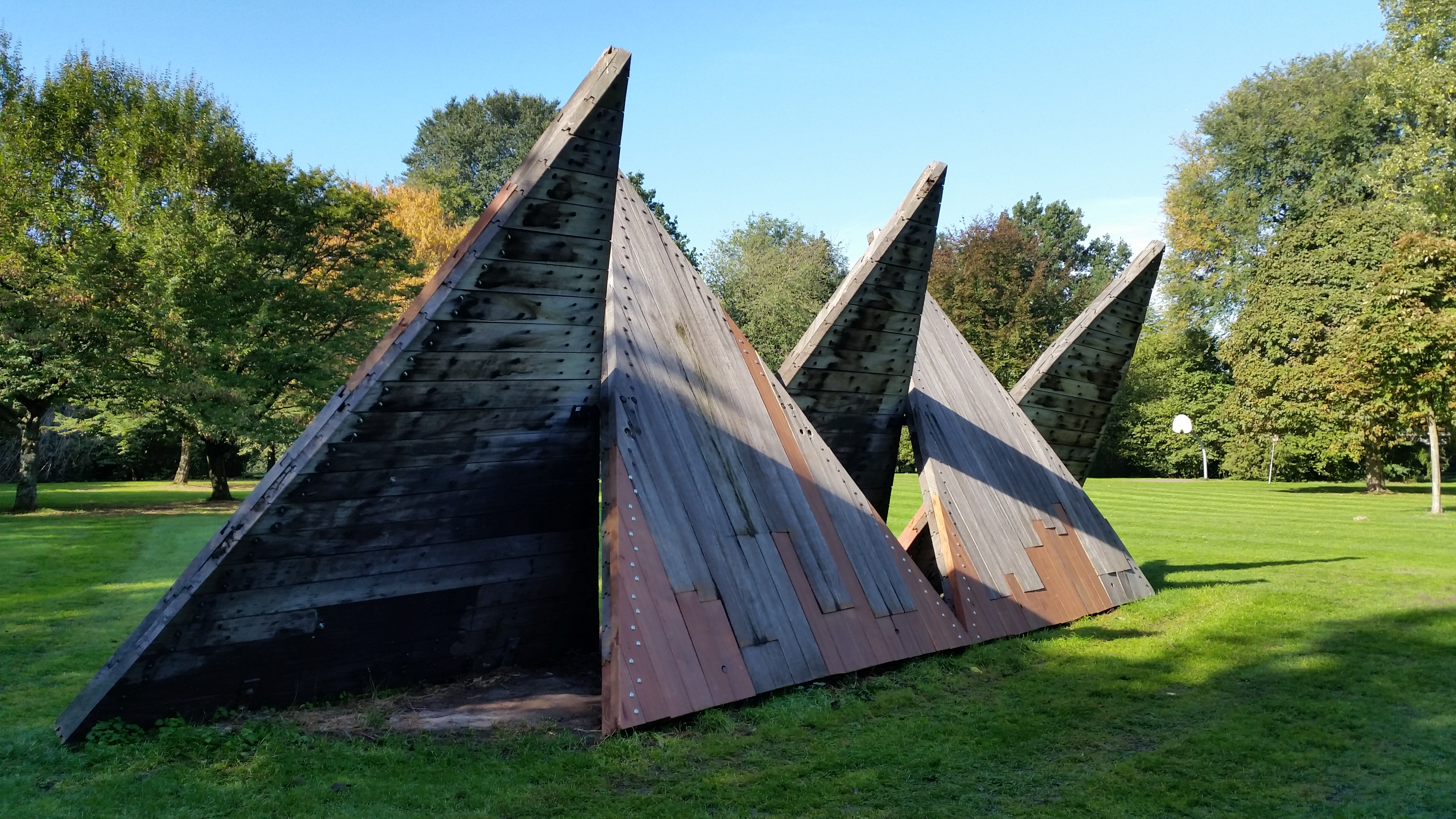 Houten driehoeken (wooden triangles) van Josum Walstra in het Gijsbrecht van Aemstelpark